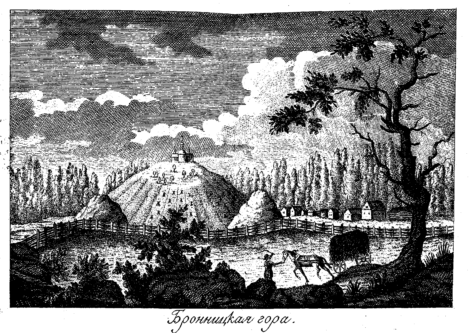 Бронницкая гора. 1802г